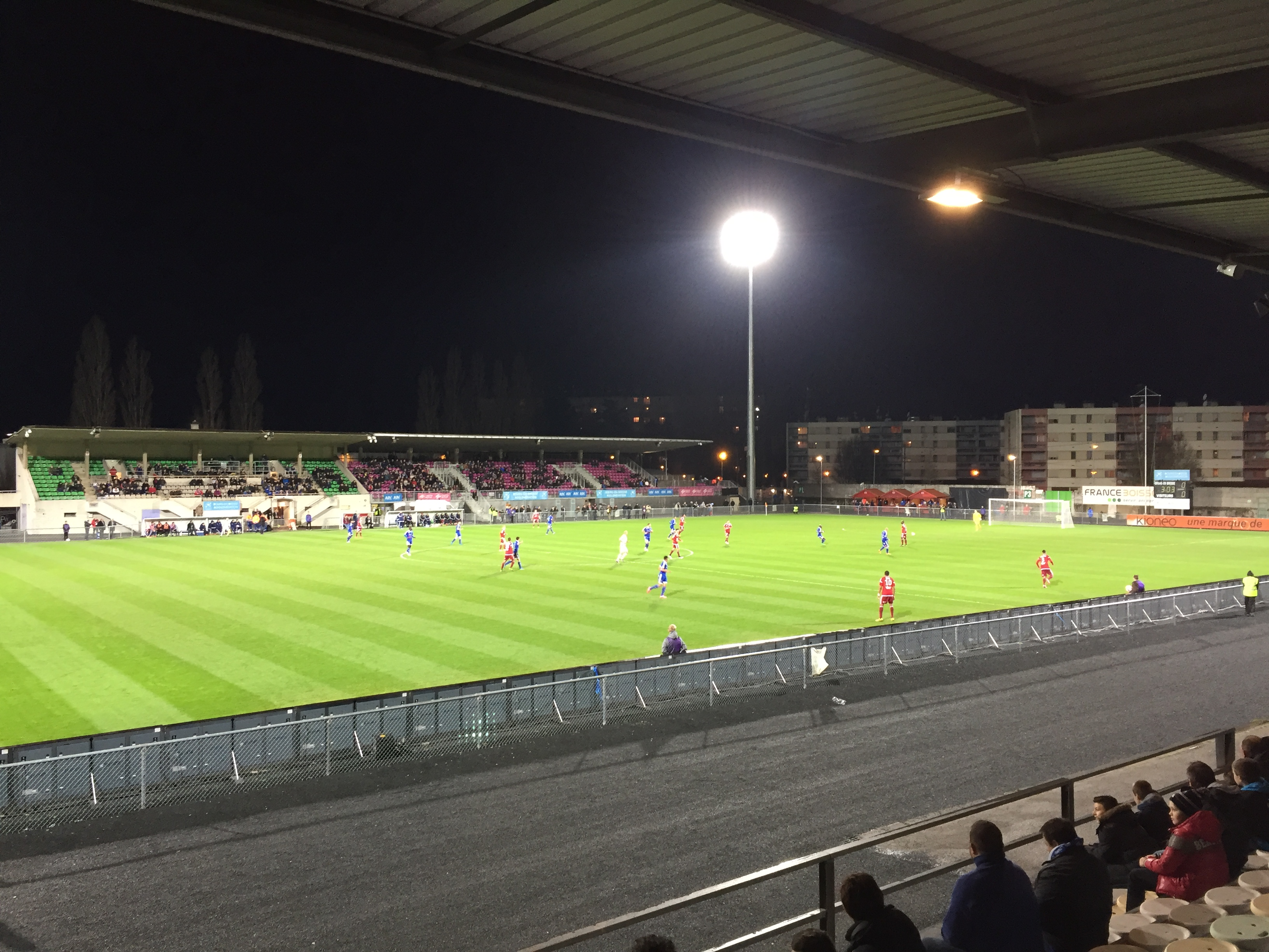 Match affrontant Bourg-en-Bresse Péronnas 01 et US Créteil-Lusitanos